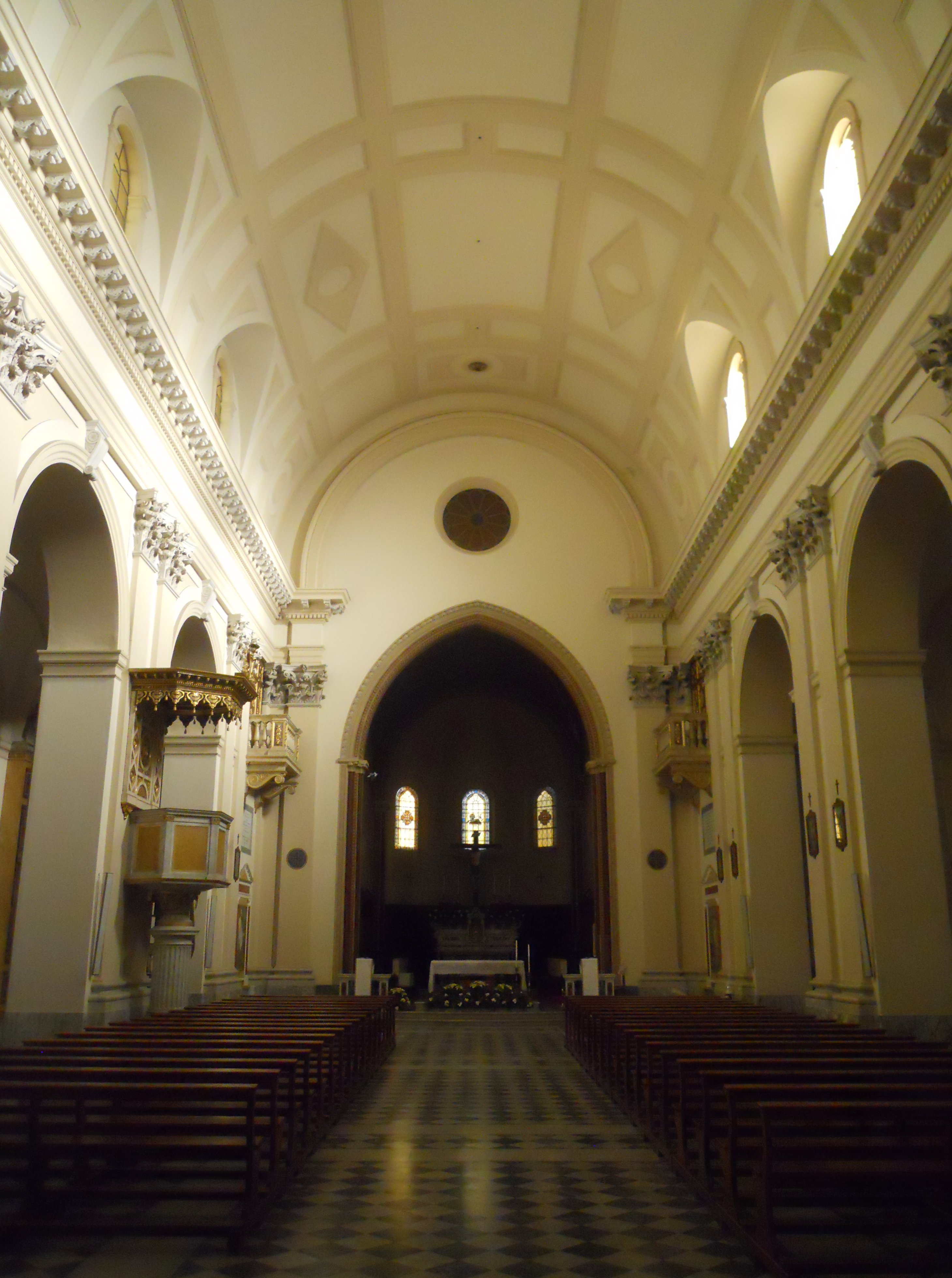 Interno della concattedrale dei Santi Margherita e Martino a Tarquinia.